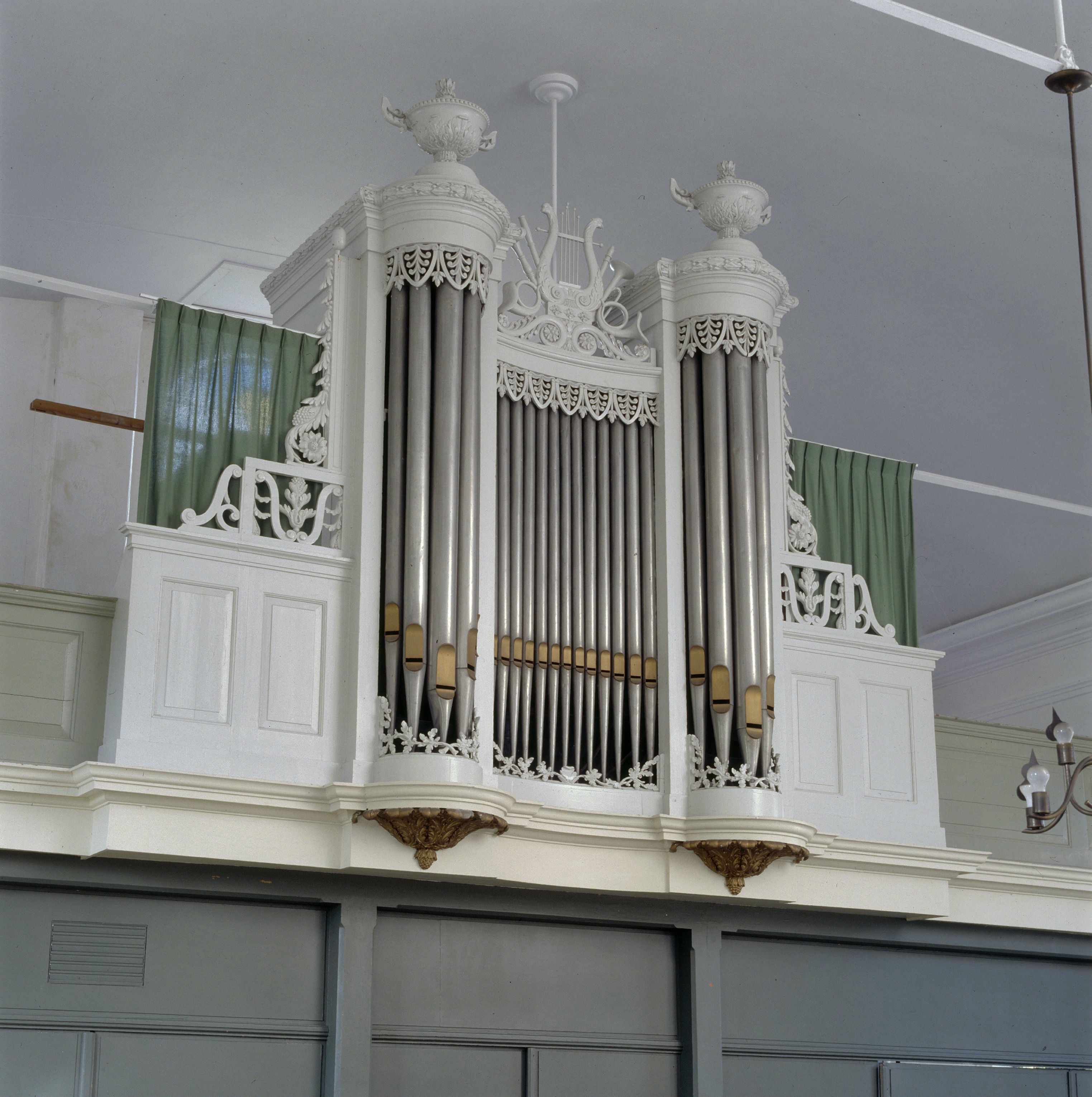 Gereformeerde kerk: Interieur, aanzicht orgel, orgelnummer 1157 (opmerking: Gefotografeerd voor Het Historische Orgel in Nederland 1819-1840, bladzijde 398)